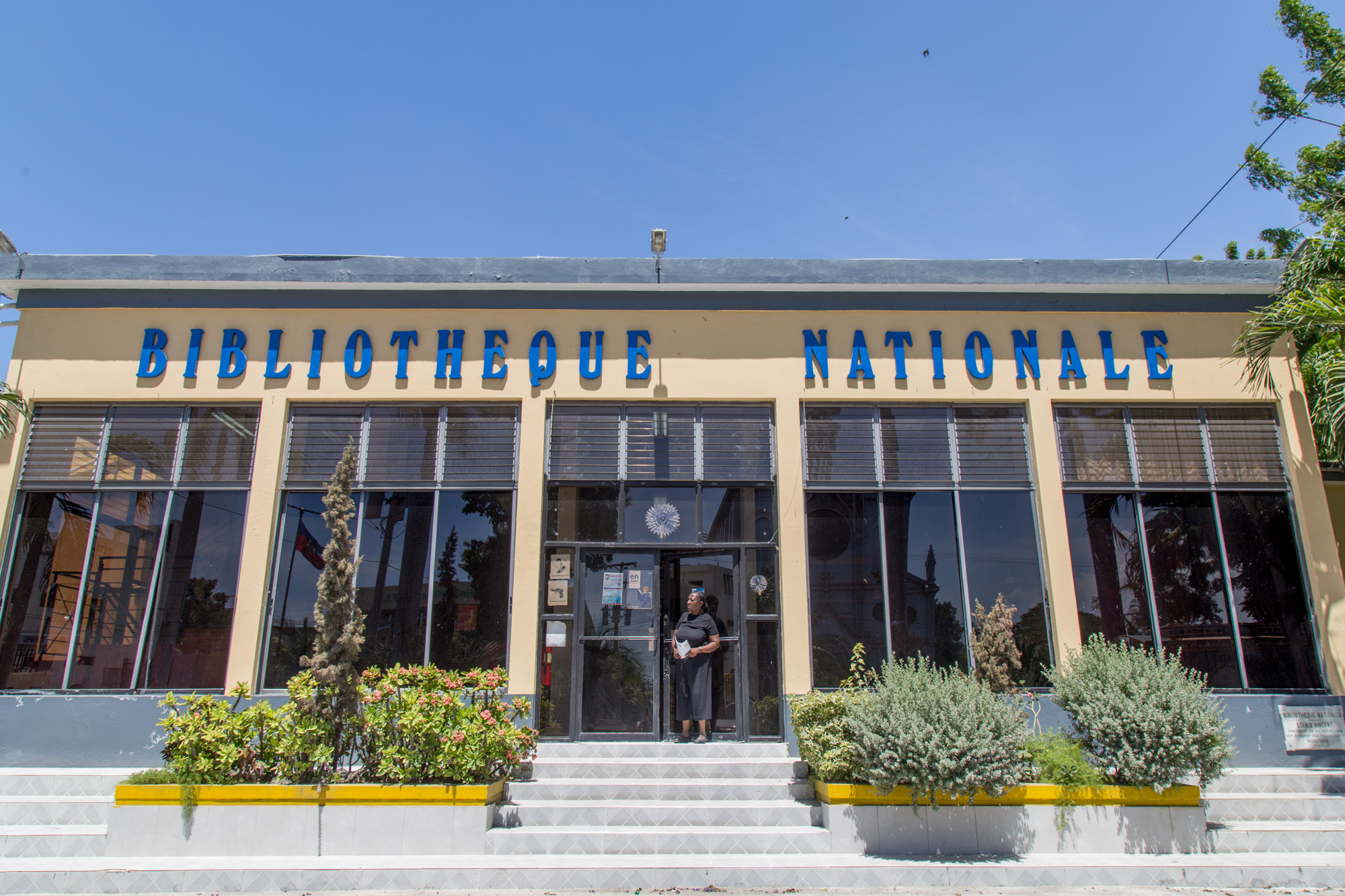 Façade de la Bibliothèque nationale d'Haïti à Port-au-Prince.